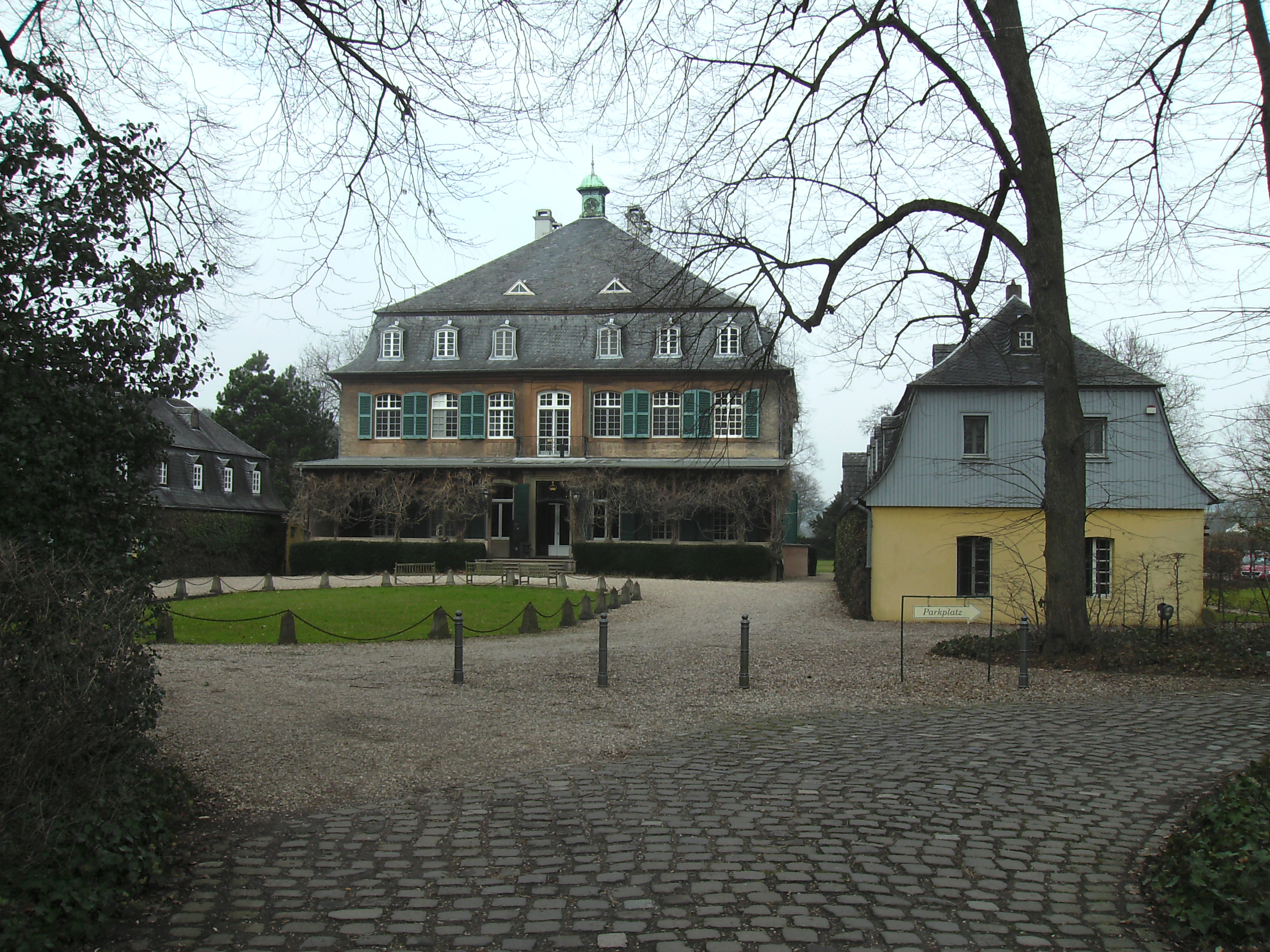 Schloss Eicherhof in Leichlingen (Rheinland).